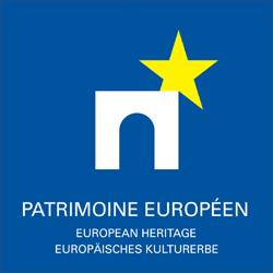 European Heritage label, Label Patrimoine Européen, Europäisches Kulturererbe-Siegel (französische Version).